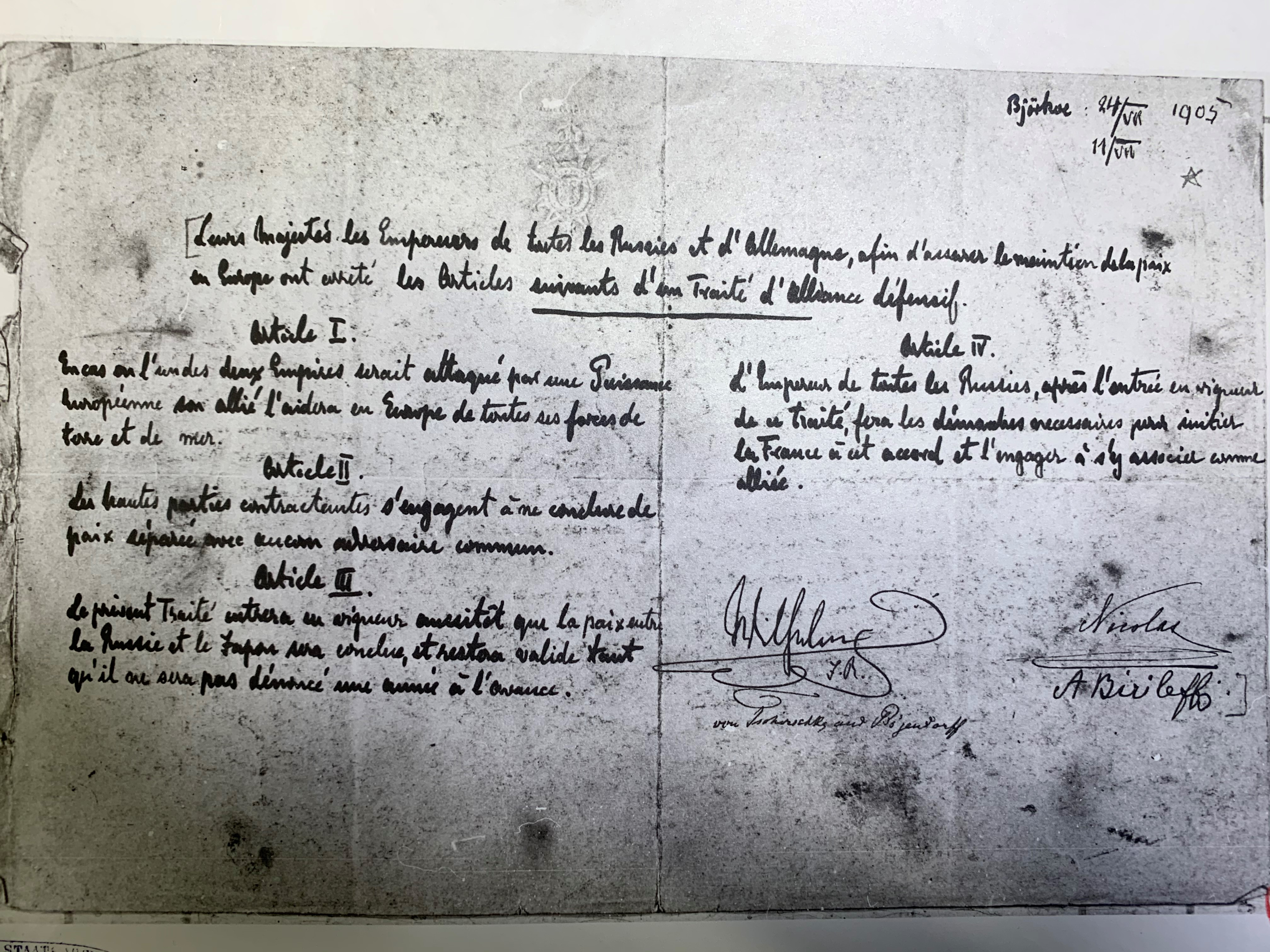 Xeroxkopie des Vertrags aus dem Jahr 1953